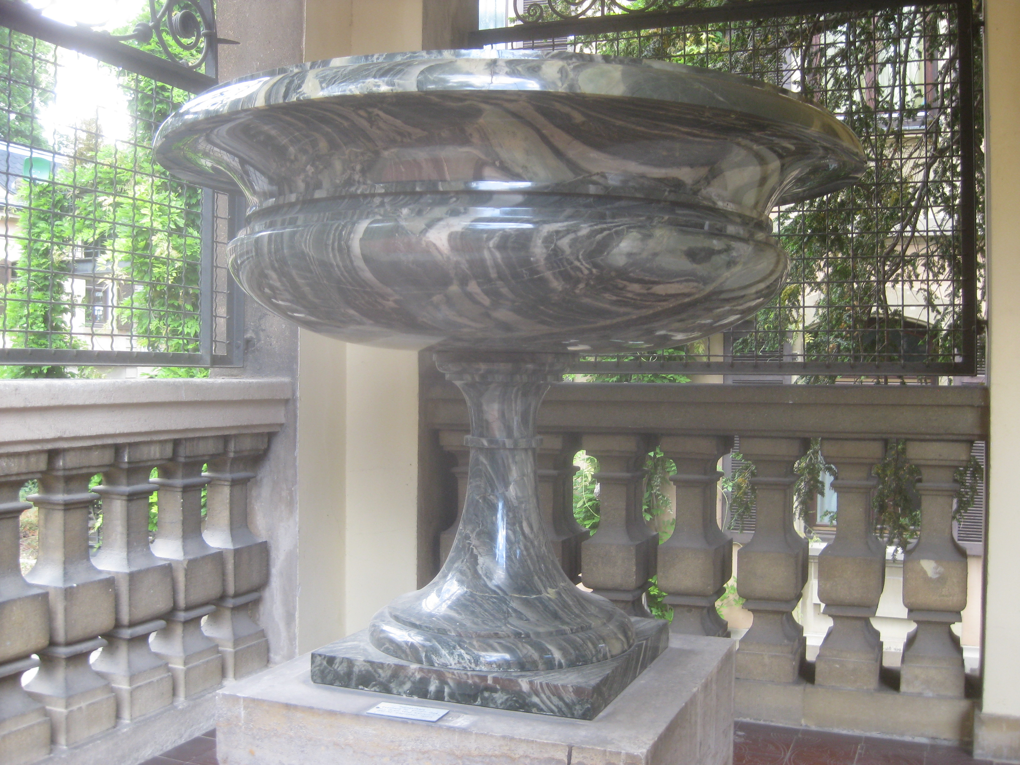 Ausladende Prunkschale mit trichterförmiger Fuß auf quadratischer Plinthe, aus glänzend poliertem, grün-gelb gebändertem sibirischen Jaspis (möglicherweise aus der Steinschleiferei Kolywan wie die zwei Volutenamphoren mit den Inventarnummern 61 und 63), quaderförmiger Kalksteinsockel, Durchmesser 1,15 m, Höhe der Schale 0,85 m, Sockelhöhe 0,40 m, Entstehungsjahr 1850-1852, unbezeichnet, ursprünglich: Stuttgart, Villa Berg, unteres Vestibül, heute: Stuttgart, Städtisches Lapidarium, Inventarnummer 4. Erhaltungszustand: gut, Sprünge am Fuß und am Korpus geklebt. Unten am Sockel bezeichnet: „Колыв[анскаи] Шлиф[овальни] фабрики Начата 1850 г. Марта 1. / Конч[ена] 1852 года Марта 9.“ (Steinschleiferei Kolywan, Arbeitsbeginn 1. März 1850, Ende 9. März 1852). Die Prunkschale schenkte Zar Nikolaus I. 1853 seiner Tochter Olga zum Einzug in Villa Berg, wo sie zusammen mit ihrem Mann, dem württembergischen Kronprinzen Karl, bis zu dessen Regierungsdantritt im Jahr 1864 wohnte.